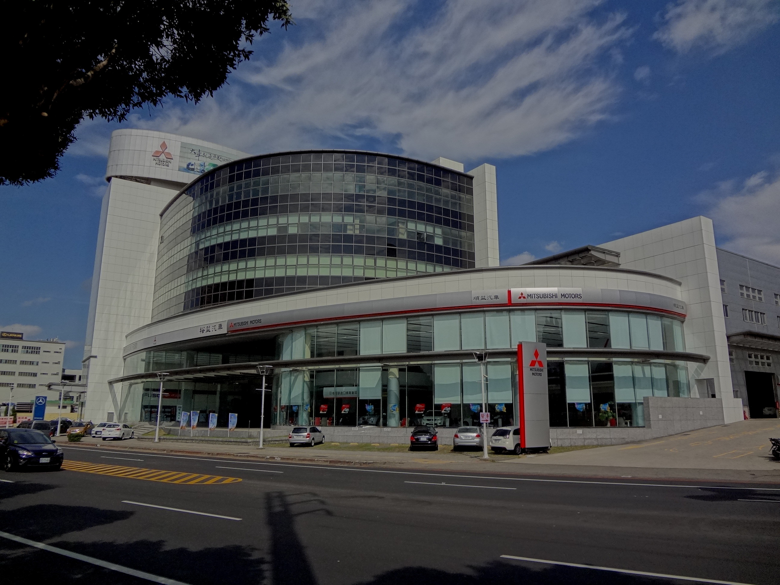 中文（台灣）: 順益中壢汽車城，2006年10月20日開幕啟用，順益汽車與裕益汽車合用，地址：桃園縣中壢市中園路158號。